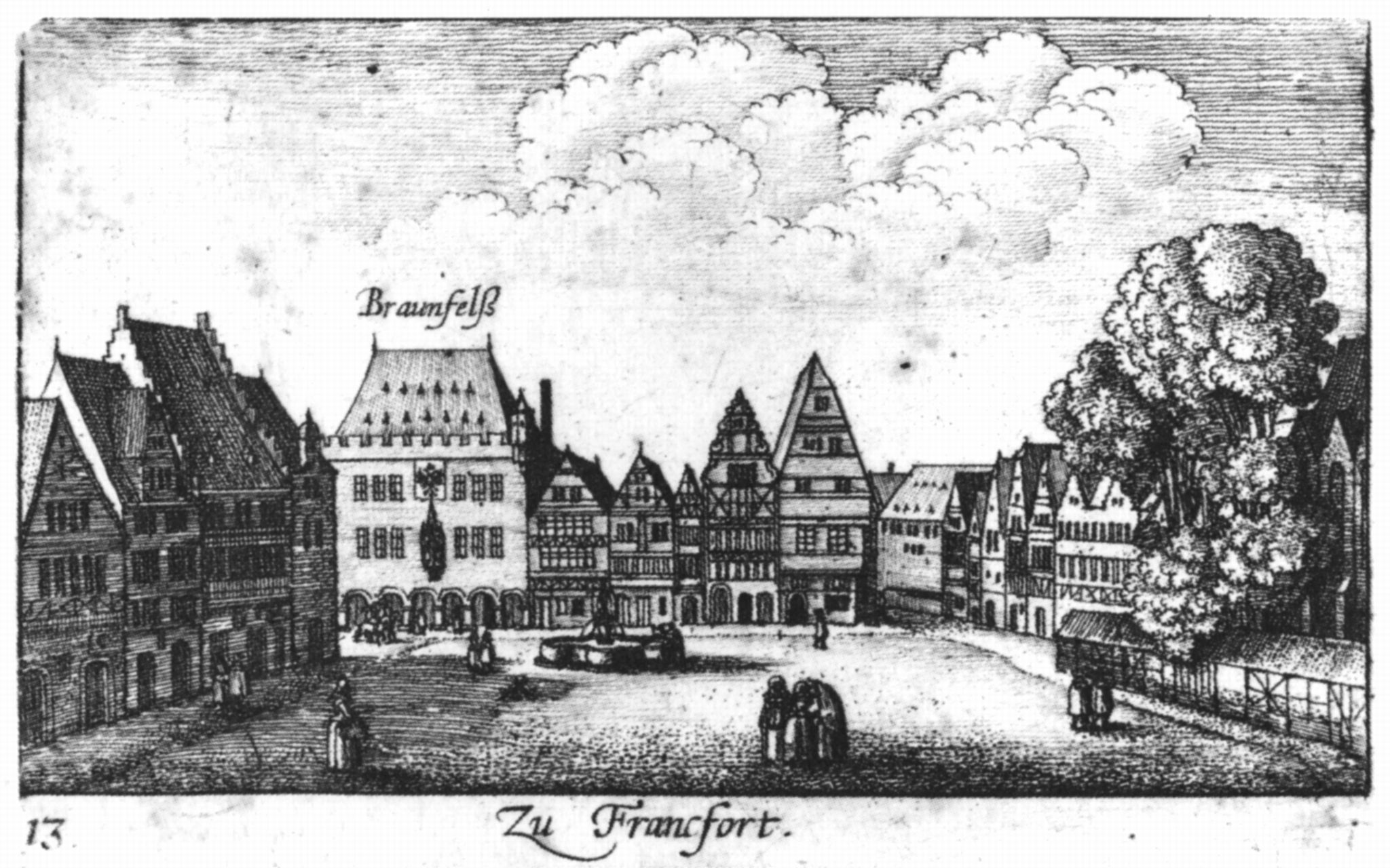 Radierung 6 x 9,4 cm; Ansicht des Liebfrauenberges von Osten 1635.